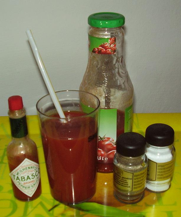 Tomatensaft tomato juice トマトジュース